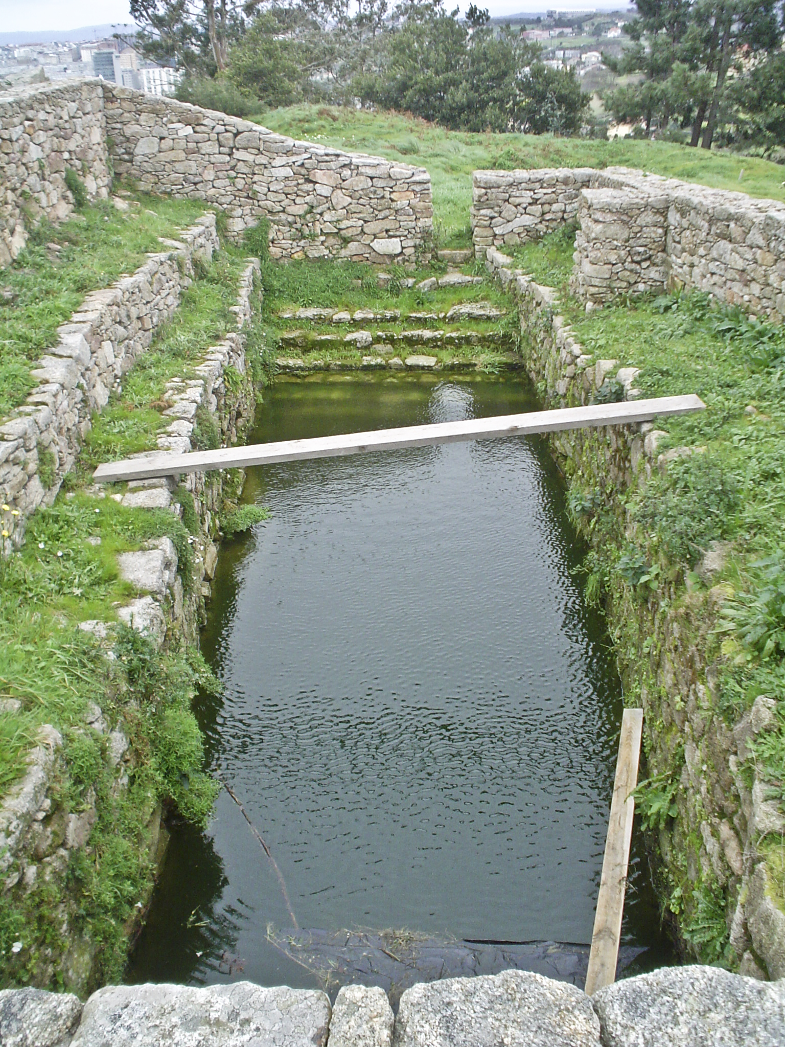 Alxive do Castro de Elviña. (A Coruña)